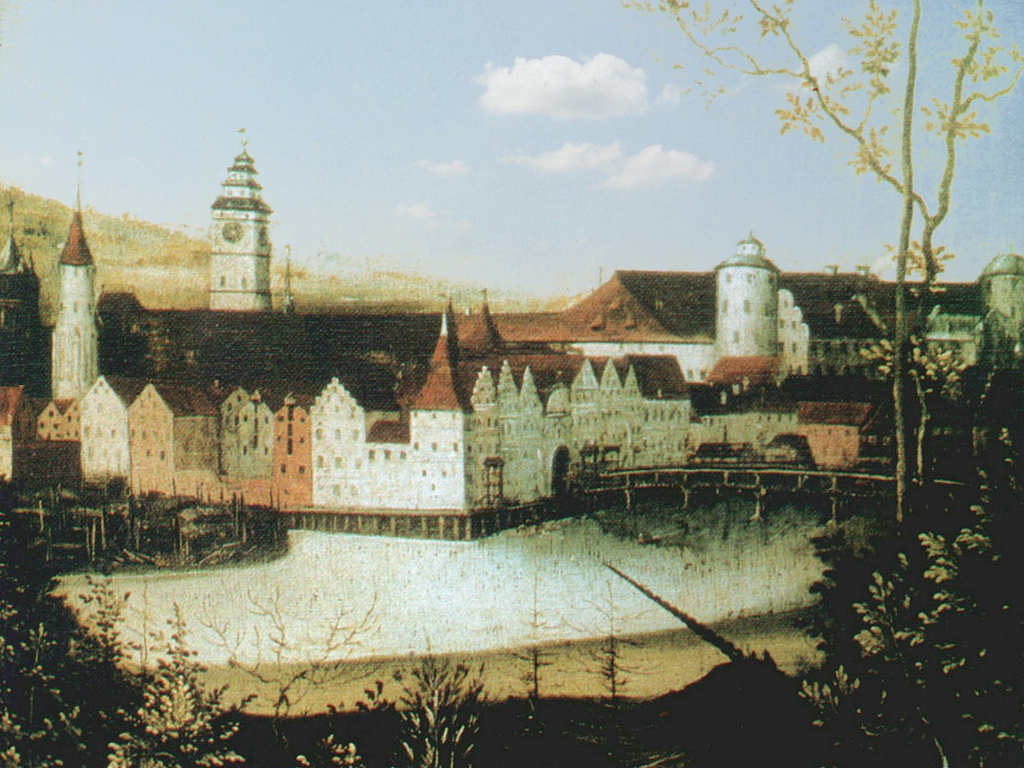 Porträt des Kneiphofs (Königsberg), Schloss und Altstädtische Kirche, 1557